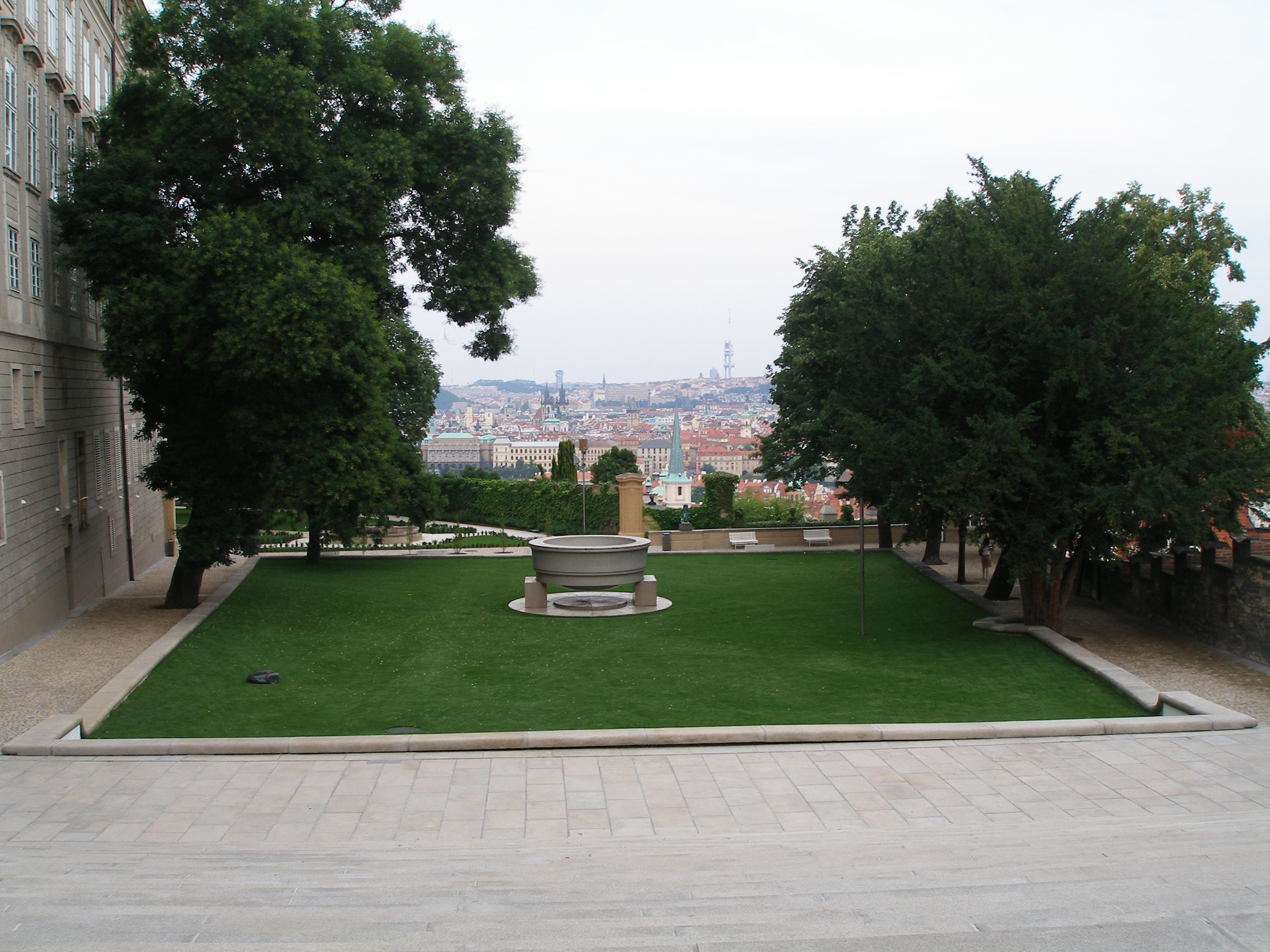 Jižní zahrady Pražského hradu. Pohled ze schodiště do Rajské zahrady z Hradčanského náměstí.